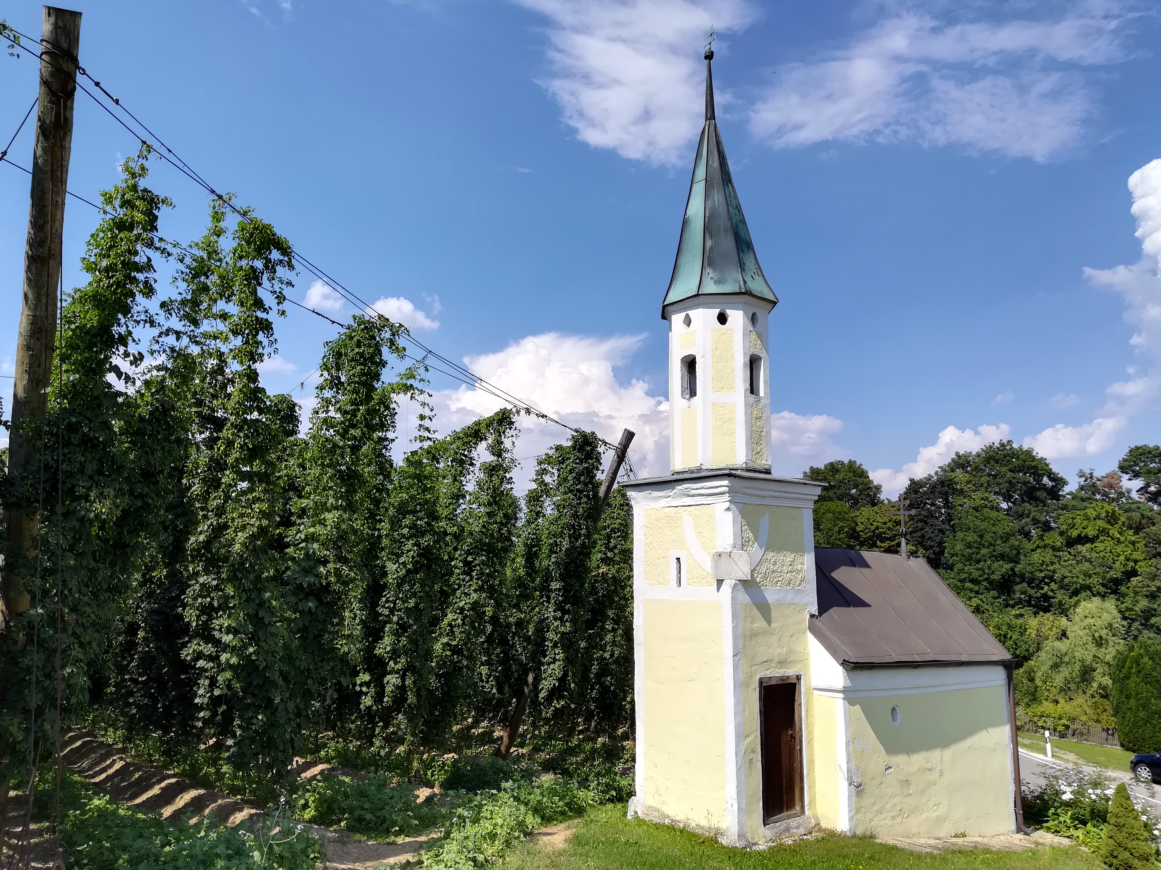 verputzter Satteldachbau mit rückseitigem Turm mit eingezogenem Oktogon und Spitzhelm, bezeichnet 1829, Turm 1930; mit Ausstattung.